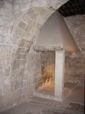 La preso del md'A, antic Palau Episcopal. La presó del Palau, encara visitable, era un espai acollidor en comparació amb la resta de presons de l'època. En comptes de tractar-se d'una masmorra subterrània, s'ubica al segon pis, oferint als condemnats vistes sobre un pati i la part alta de la ciutat. També estava equipada amb una llar de foc. Els reclusos tampoc eren els ordinaris: es tractava dels religiosos castigats pel bisbe o pels tribunals de l'Església.